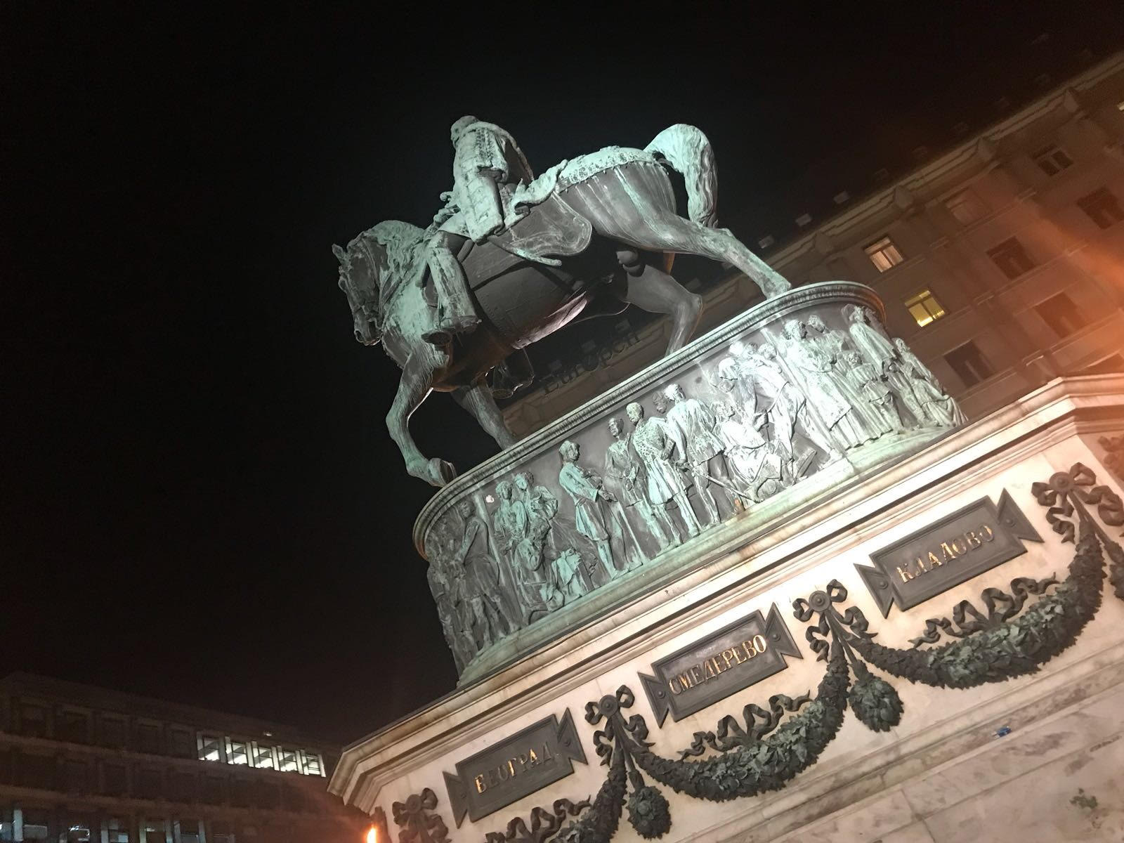 Споменик кнезу Михаилу у Београду налази се на Тргу Републике